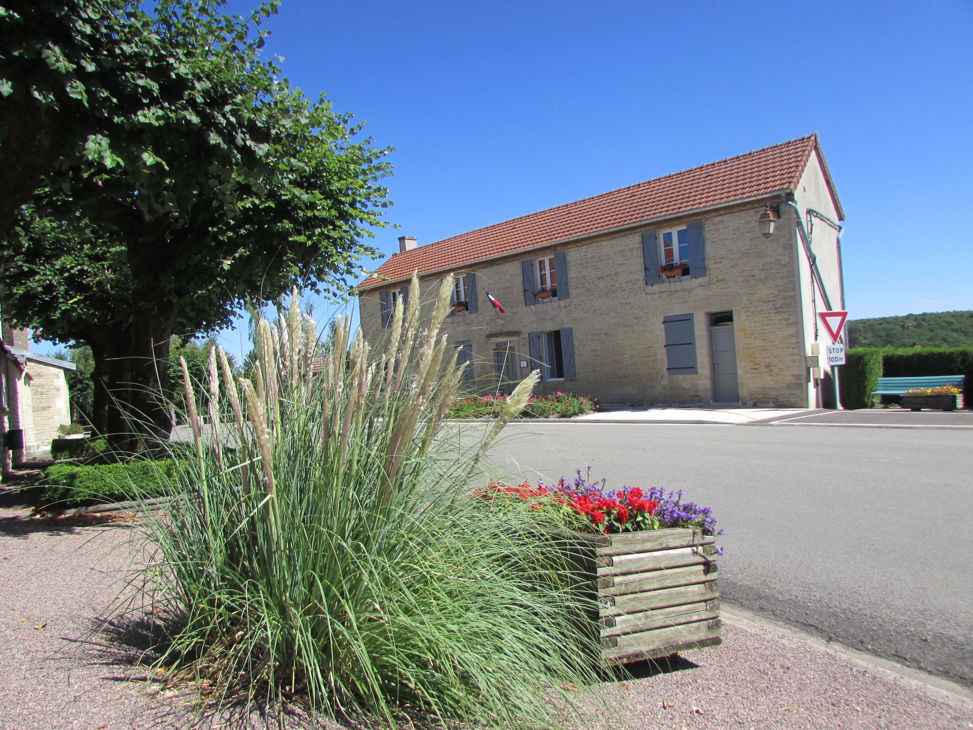 La mairie